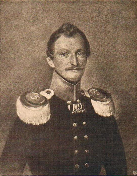 Hermann von Roeder [1797–1857, preußischer Generalmajor]. Nach einer Schwarz-Weiß-Zeichnung aus der Zeit von 1834–1844. [In dieser Zeit war er Kommandeur des Brandenburgischen Jäger-Bataillons Nr. 3 in Lübben.]